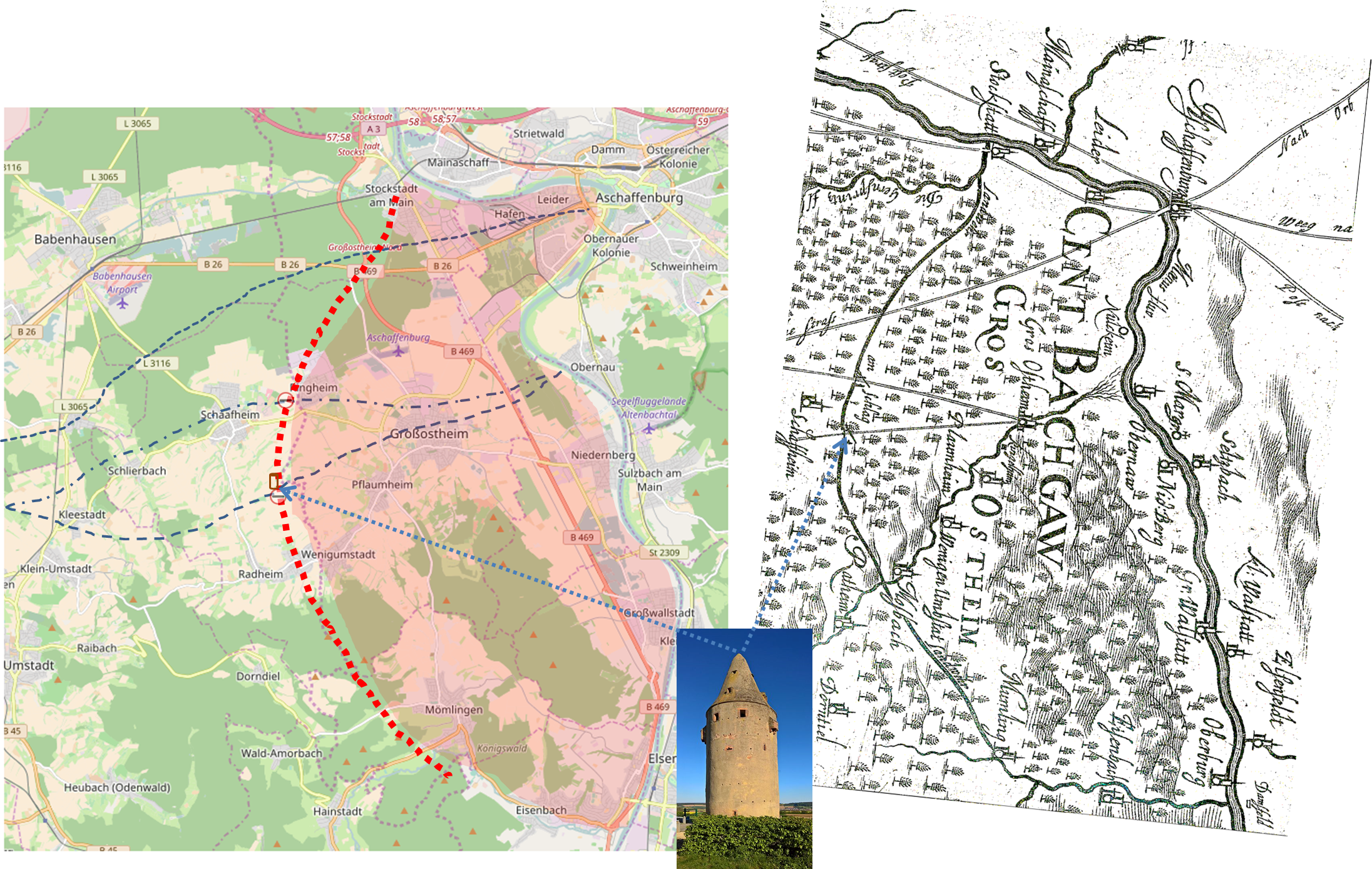 Der in-etwa Verlauf der Bachgauer Landwehr nach der alten Karte von 1695 mit Lage der Zollstraßen und der Schaafheimer Warte unter Verwendung: des Lizenzgleichen Fotos File:2017-05-10 Wartturm-Schaafheim-02.jpg und des gemeinfreien File:Cent Bachgaw 1695.jpg